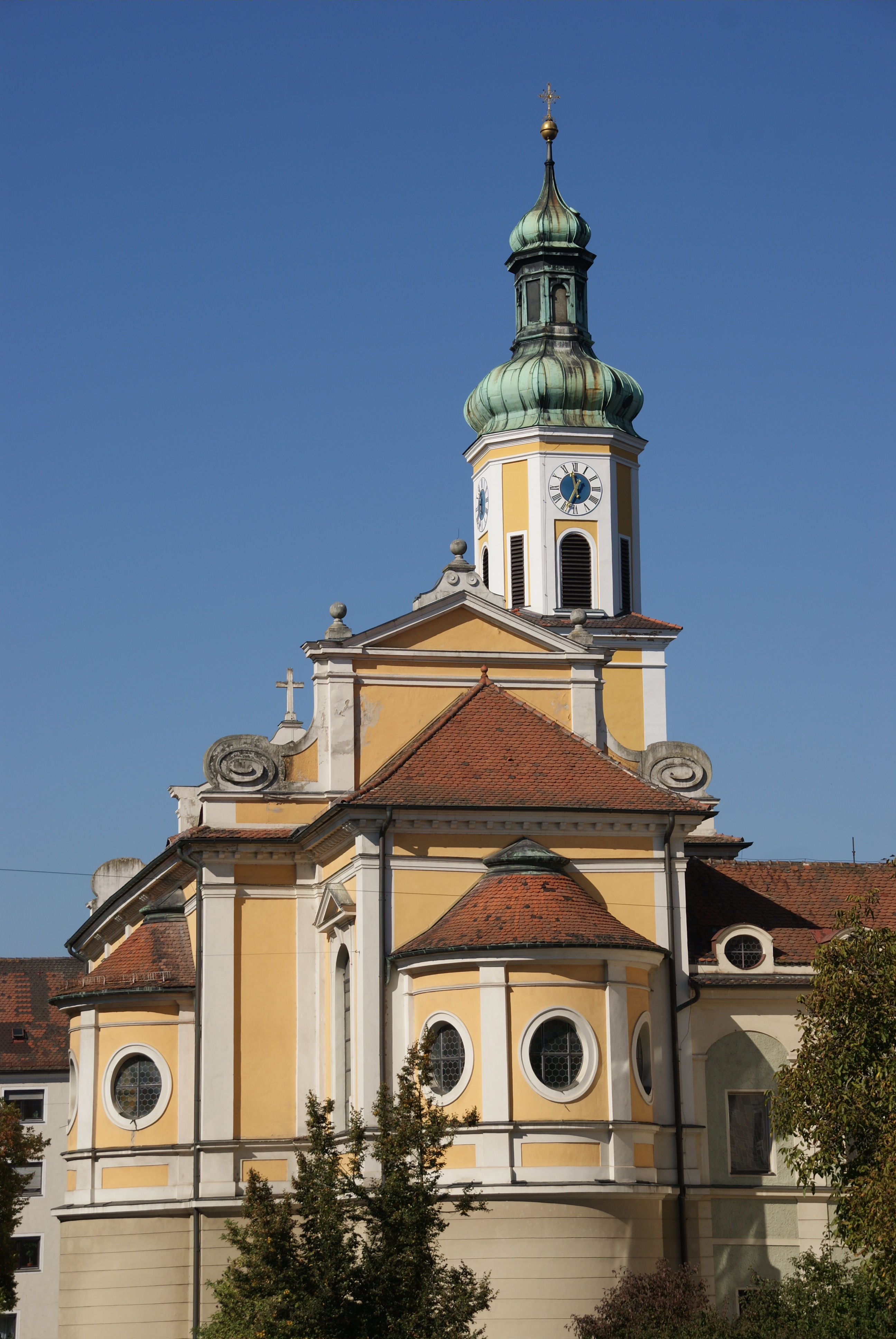 St. Theresia von Osten